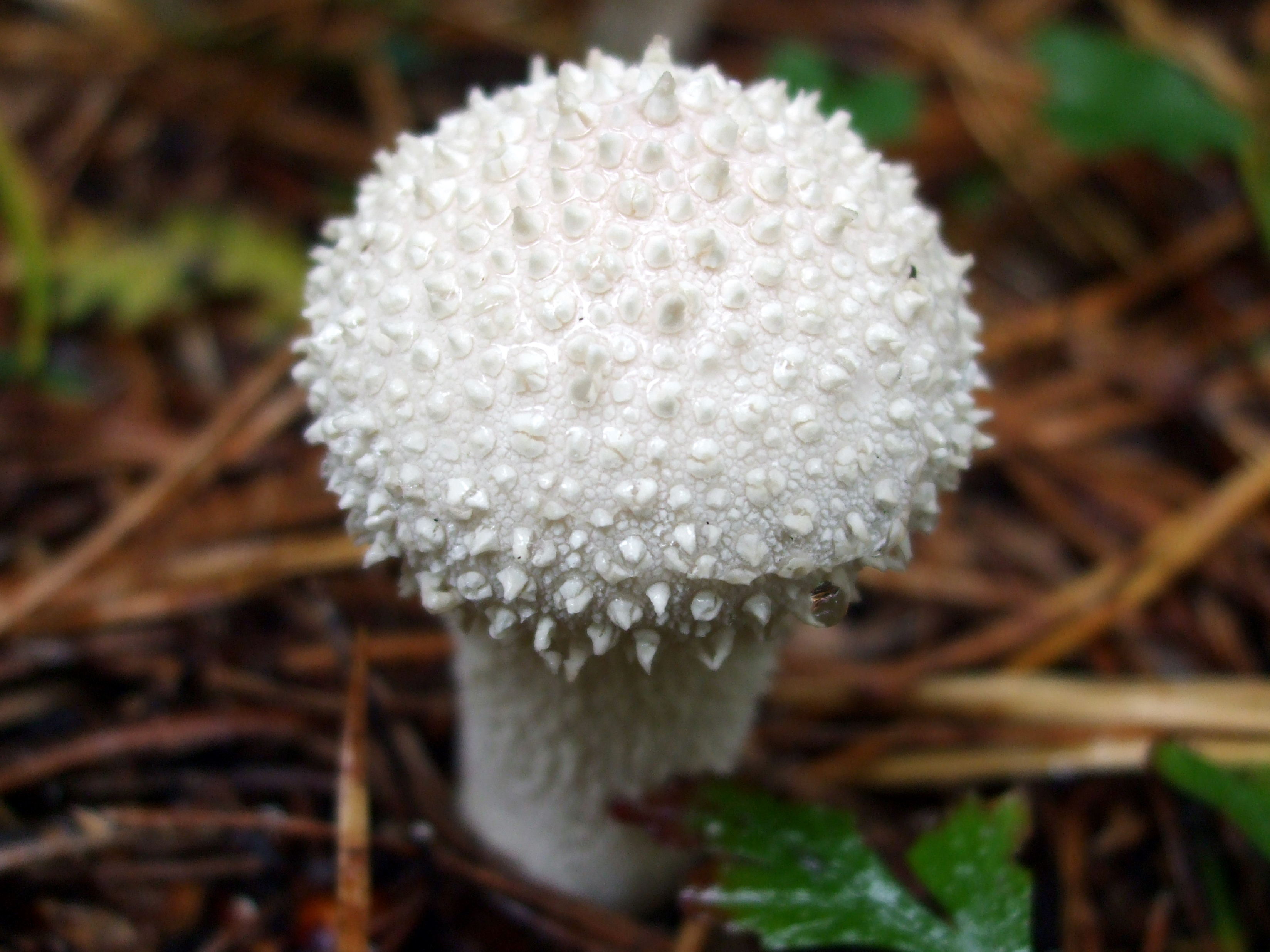 Lycoperdon perlatum